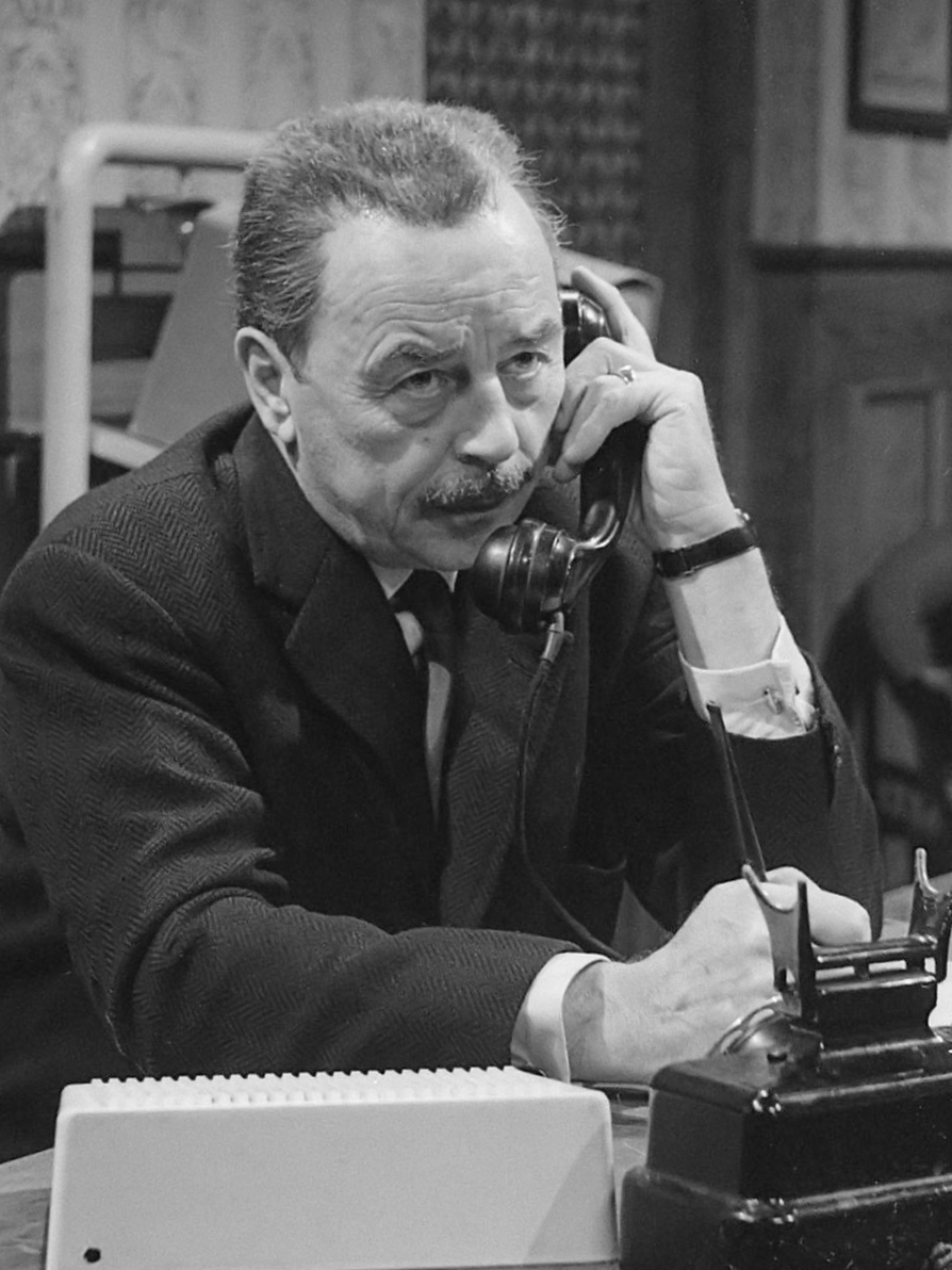 Jan Teulings in de rol van de nieuwe Maigret 14 mei 1966